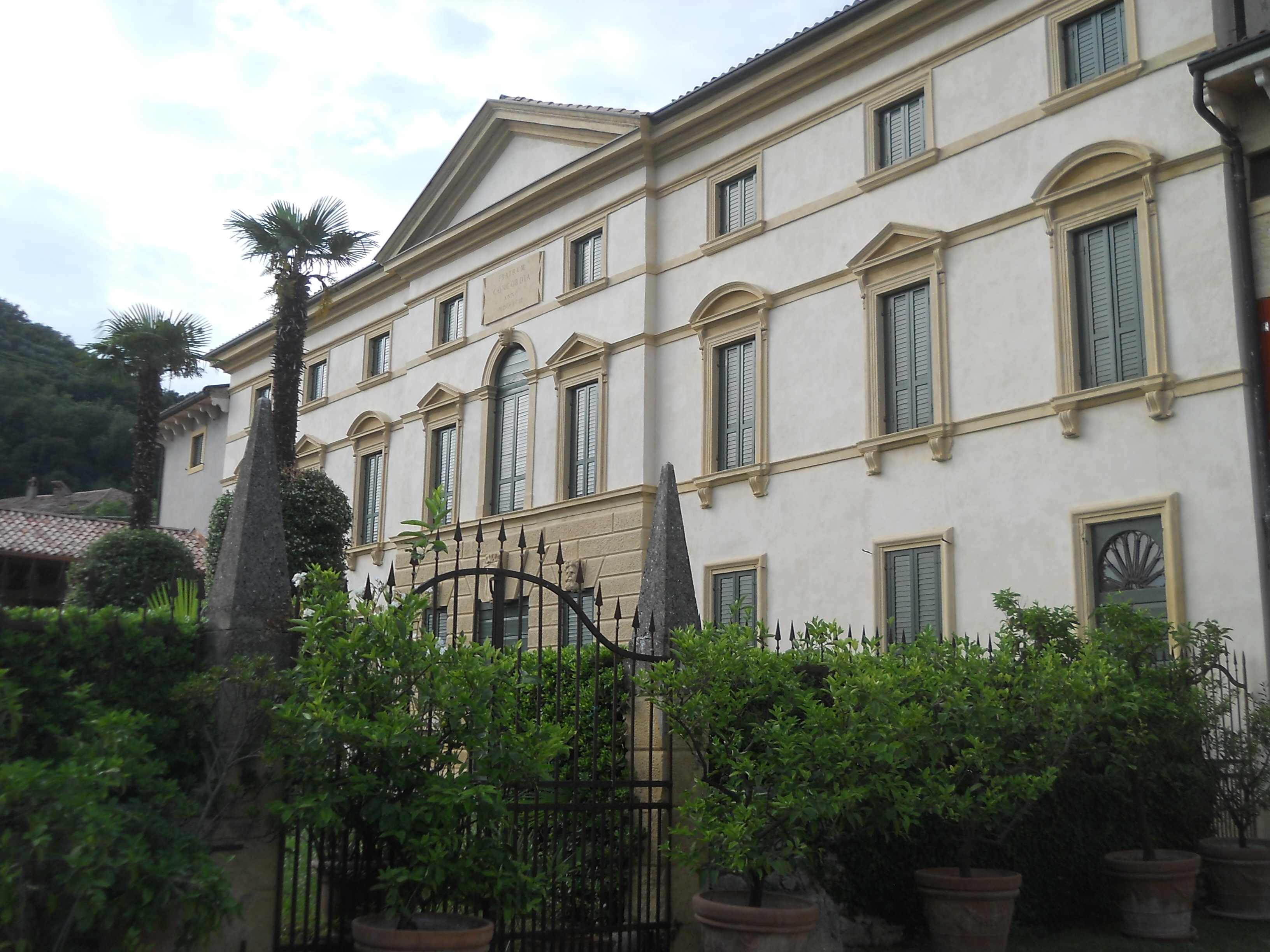 Villa Lorenzi, Buella, Benati a Marano di Valpolicella